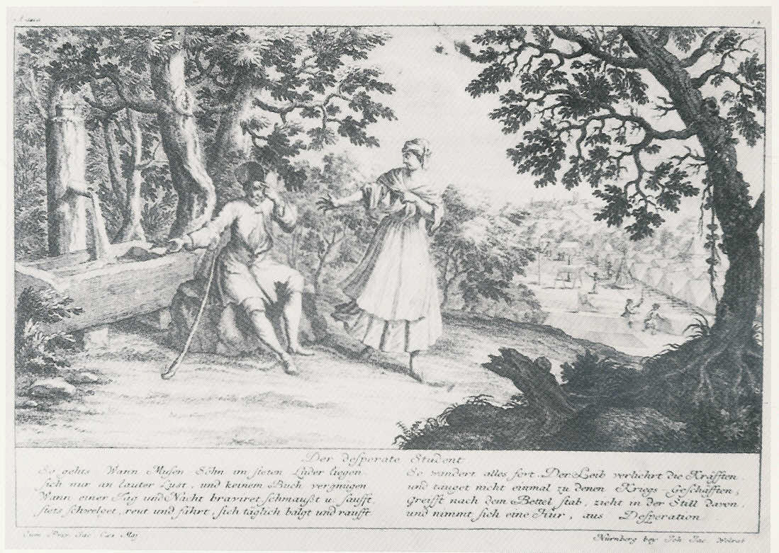 "Dendrono" (Johann Georg Puschner), "Der desperate Student", Kupferstich von 1725, Szenen aus dem Leben der Studenten an der Universität Altdorf: Der desperate Student So gehts, Wann Musen-Söhn im steten Luder liegen, sich nur an lauter Lust und keinem Buch vergnügen. Wann einer Tag und Nacht braviret, schmaußt und saufft, stets schwelget, reut und fährt, sich täglich balgt und raufft. So wandert alles fort: Der Leib verliert die Kräfften und tauget nicht einmal zu denen Kriegs-Geschäfften, greifft nach dem Bettelstab, zieht in der Still davon, und nimmt sich eine Hur, aus Desperation. Rechte abgelaufen, Public Domain